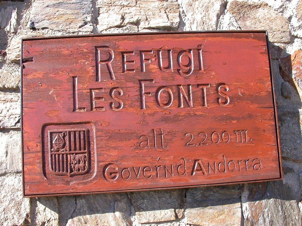 Refuges Andorre